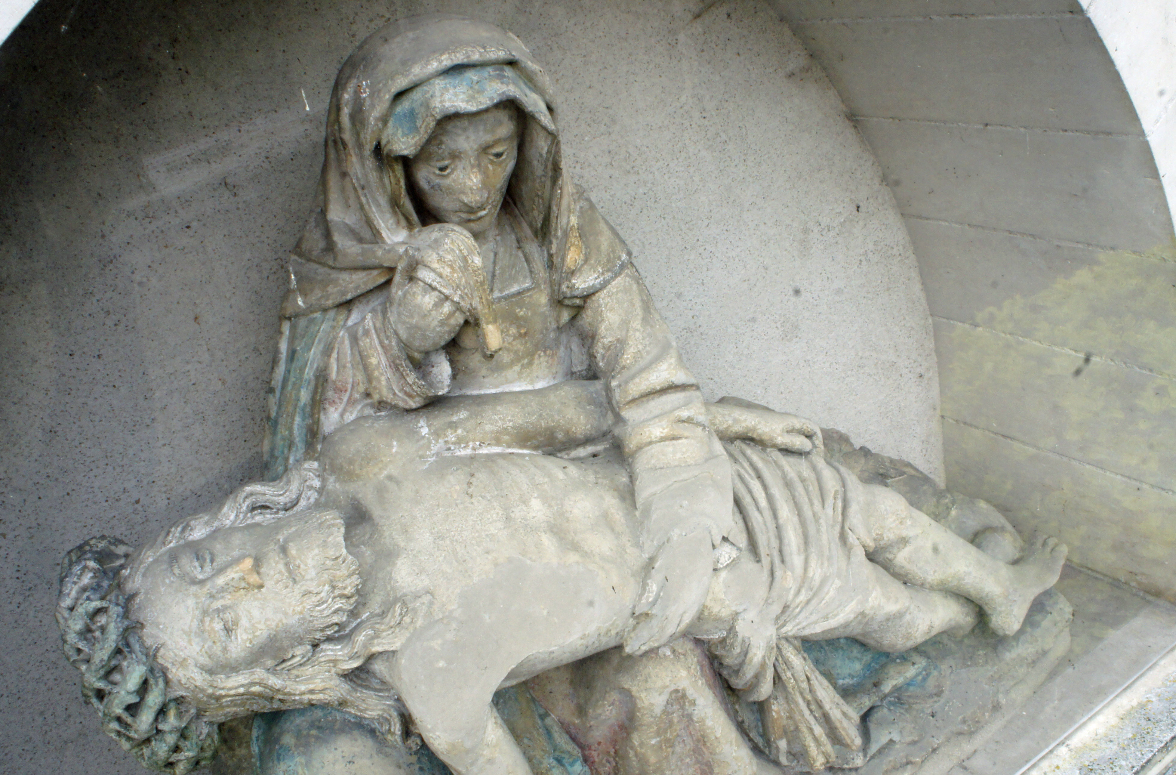 Église de Merfy (Marne, France), Pietà du XVIe siècle venant du bourg de Villers-Sainte-Anne qui a été détruit en 1629.